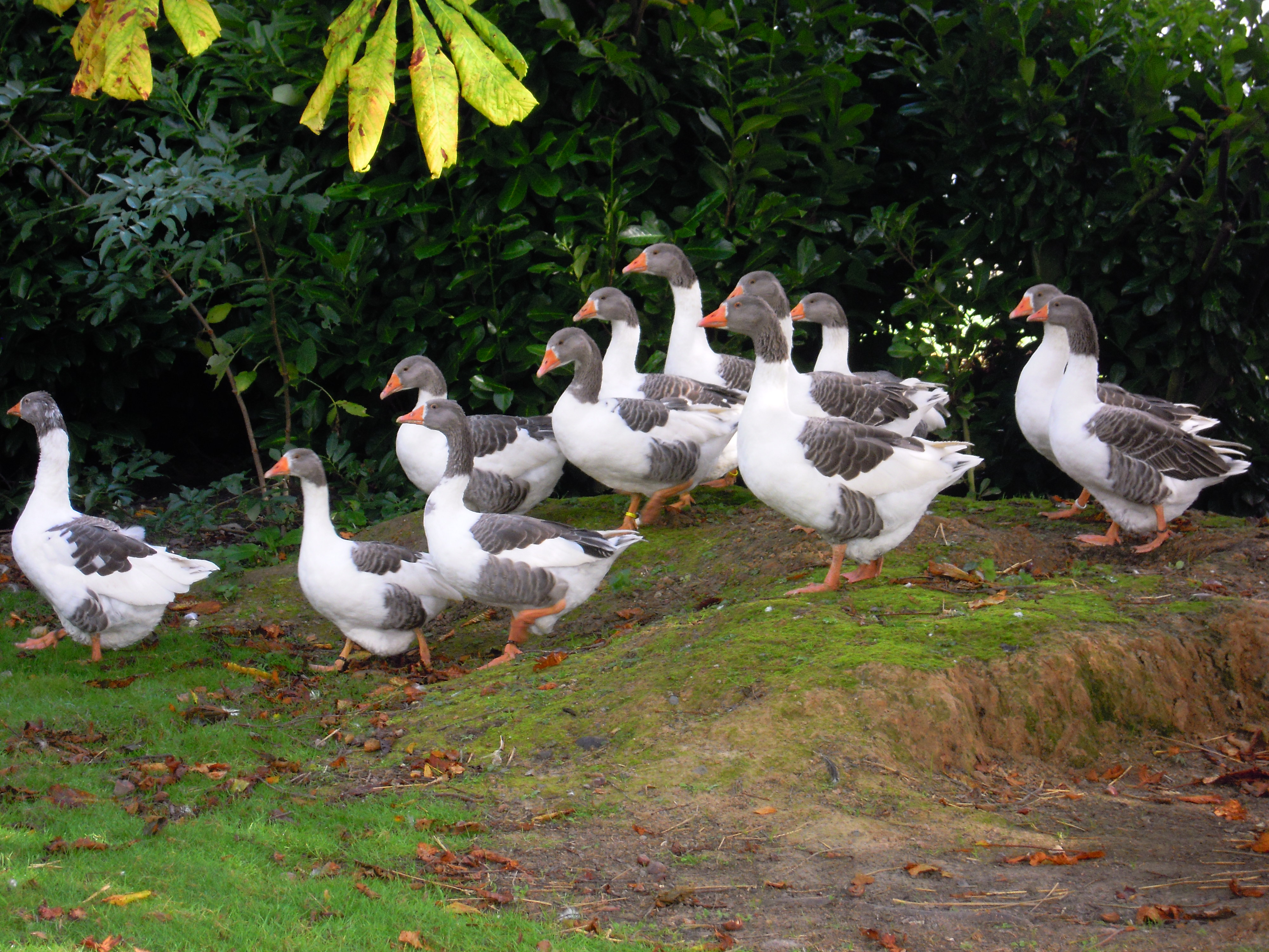 Oies Flamande Au Domaine des 3 Coqs